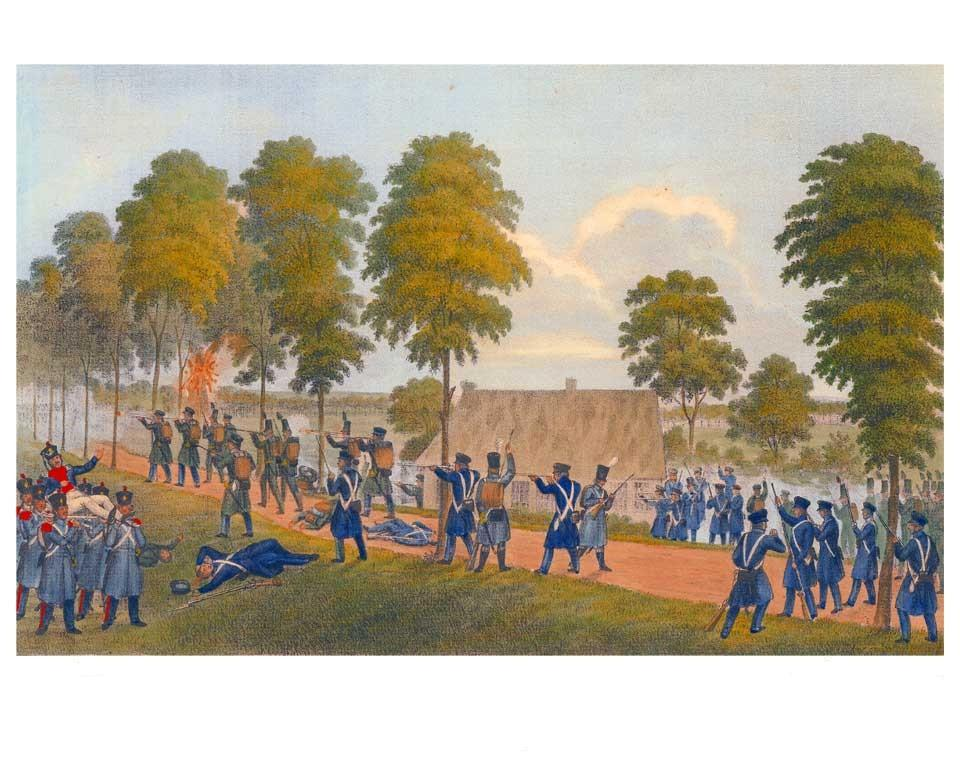 Hamburg - Die Franzosenzeit: Gefecht zwischen der Bürgergarde, der hanseatischen Legion, den hannoverschen Jägern, den Mecklenburgern und den Dänen einerseits und den französischen Besatzern andererseits am 13. März 1813 auf der Veddel